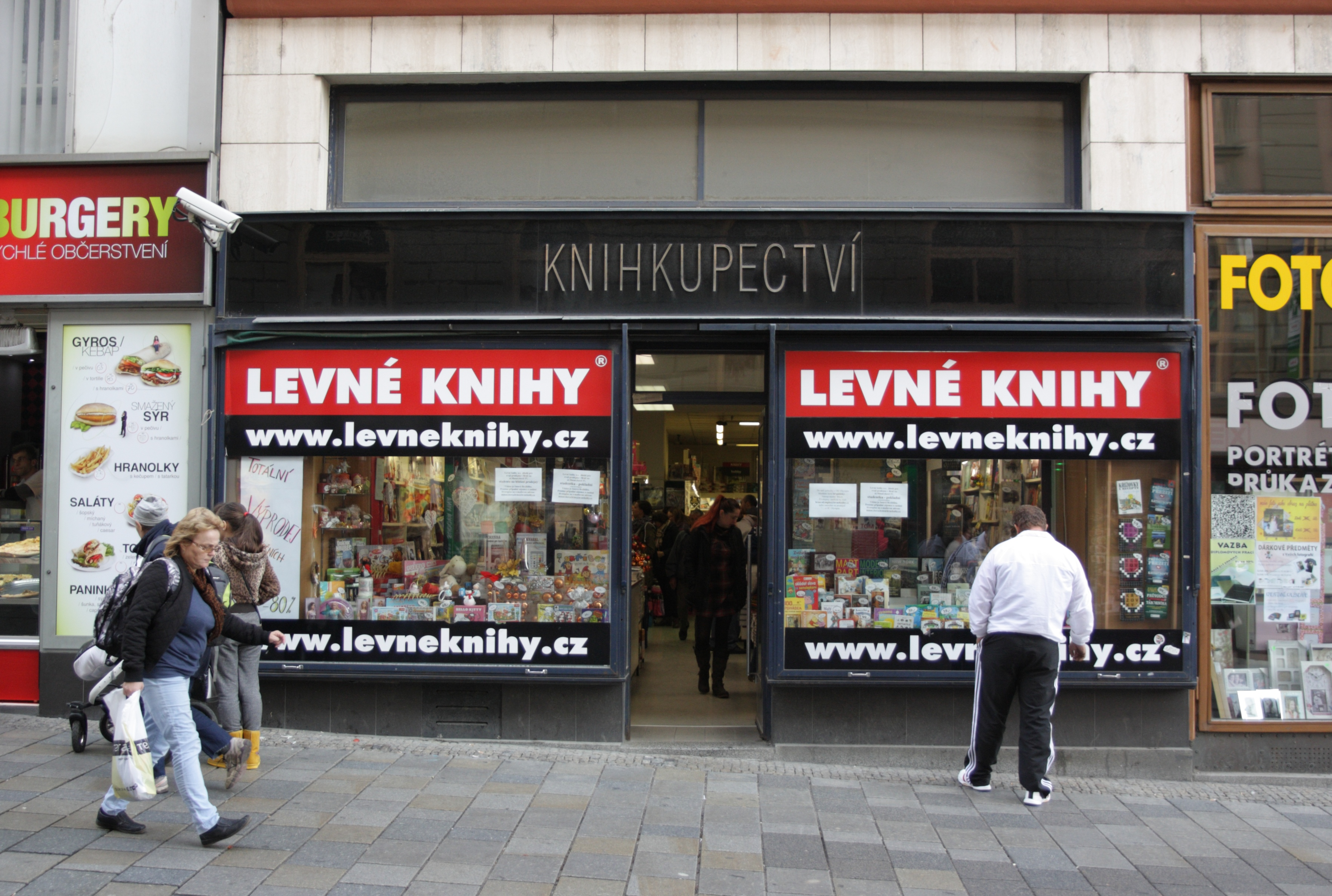 Brno - Masarykova ulice, prodejna Levné knihy.